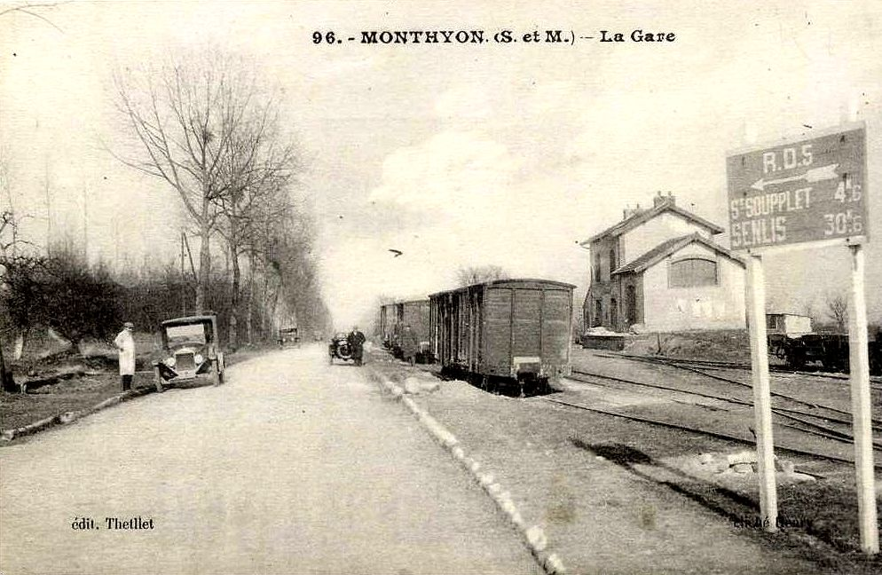 La gare de Monthyon du tramway de Meaux à Dammartin, le long de la RN 330. La halle à marchandises à été construite pendant la période 1921-24.